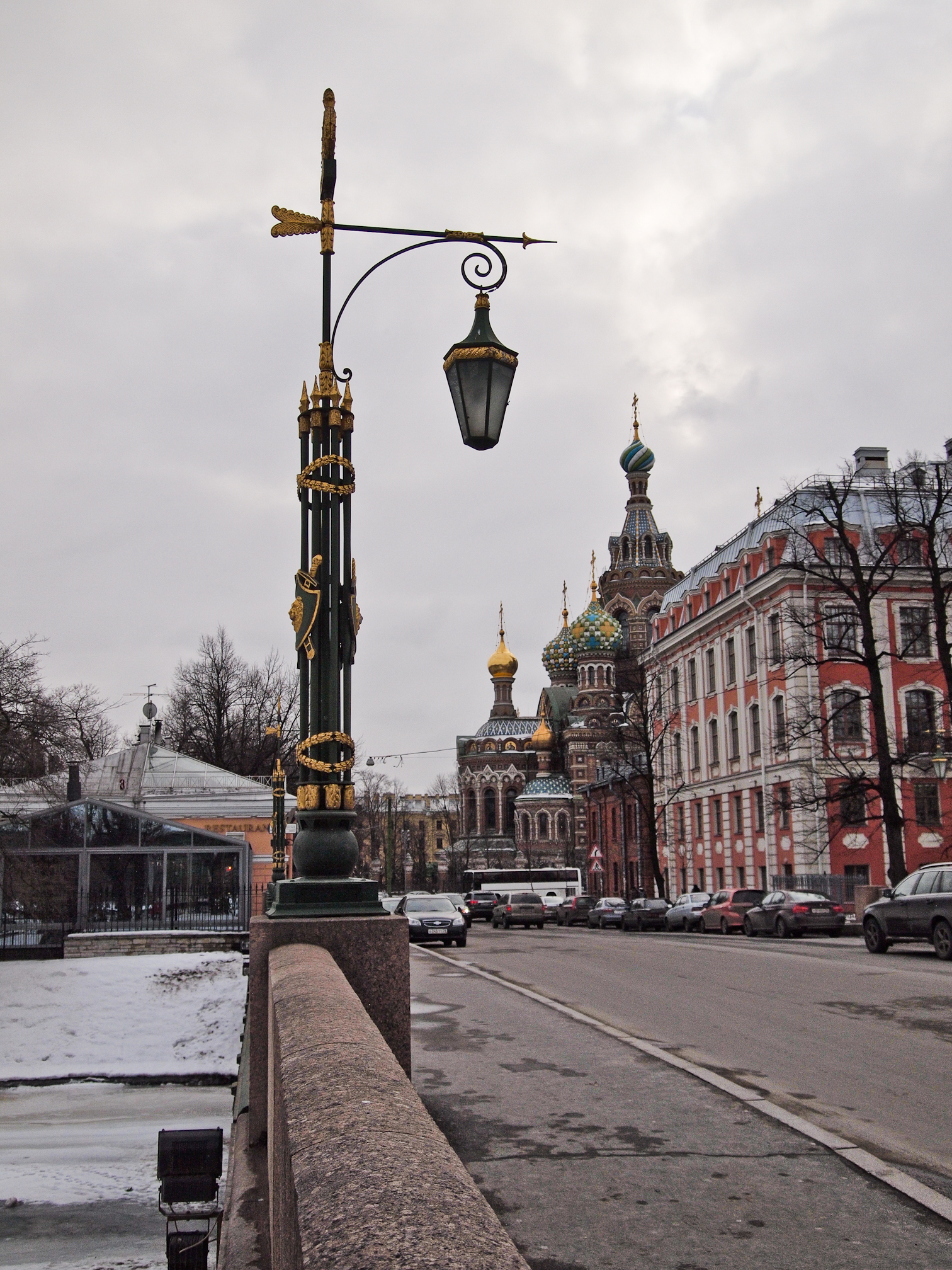 Фонарь на Втором Садовом мосту